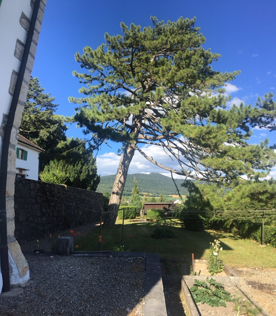 Photographie personnelle